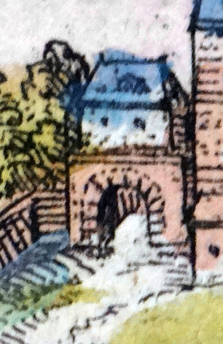 Viehpforte der äußeren Stadtmauer von Worms. Detail aus: Georg Braun, Simon Novellanus und Franz Hogenberg: Beschreibung und Contrafactur der vornembster Stät der Welt. Heinrich von Ach, Köln 1574. Tafel zwischen den Seiten 35 und 36. Stadtarchiv Worms: Abt. 214 Nr. 1499.